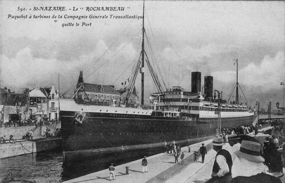 Le Rochambeau, Paquebot a turbine, Compagnie Générale Transatlantique, vintage postcard